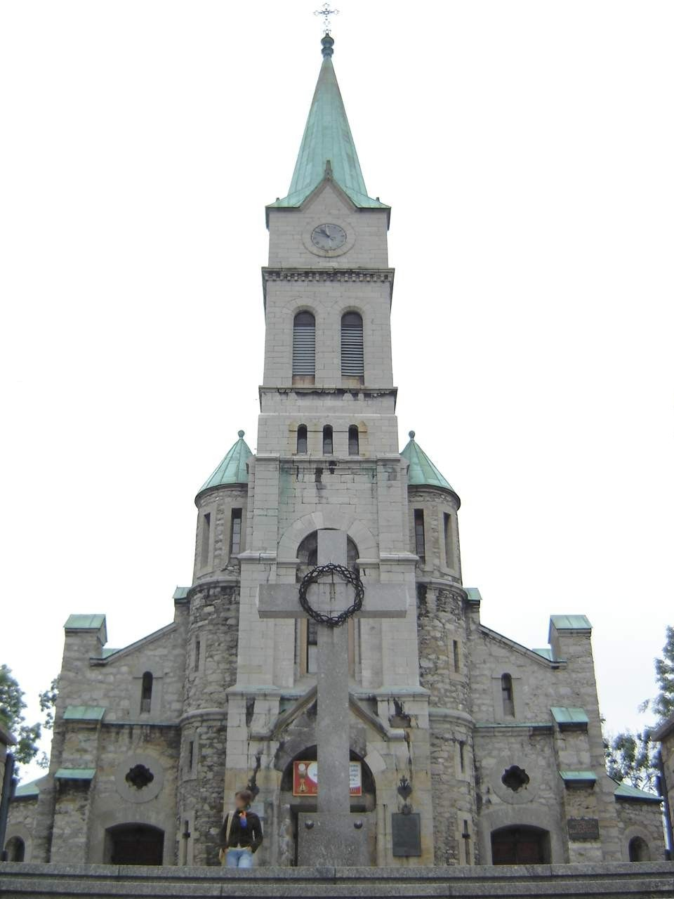 Kościół Najświętszej Rodziny w Zakopanem - najstarsza rzymskokatolicka, murowana świątynia Zakopanego